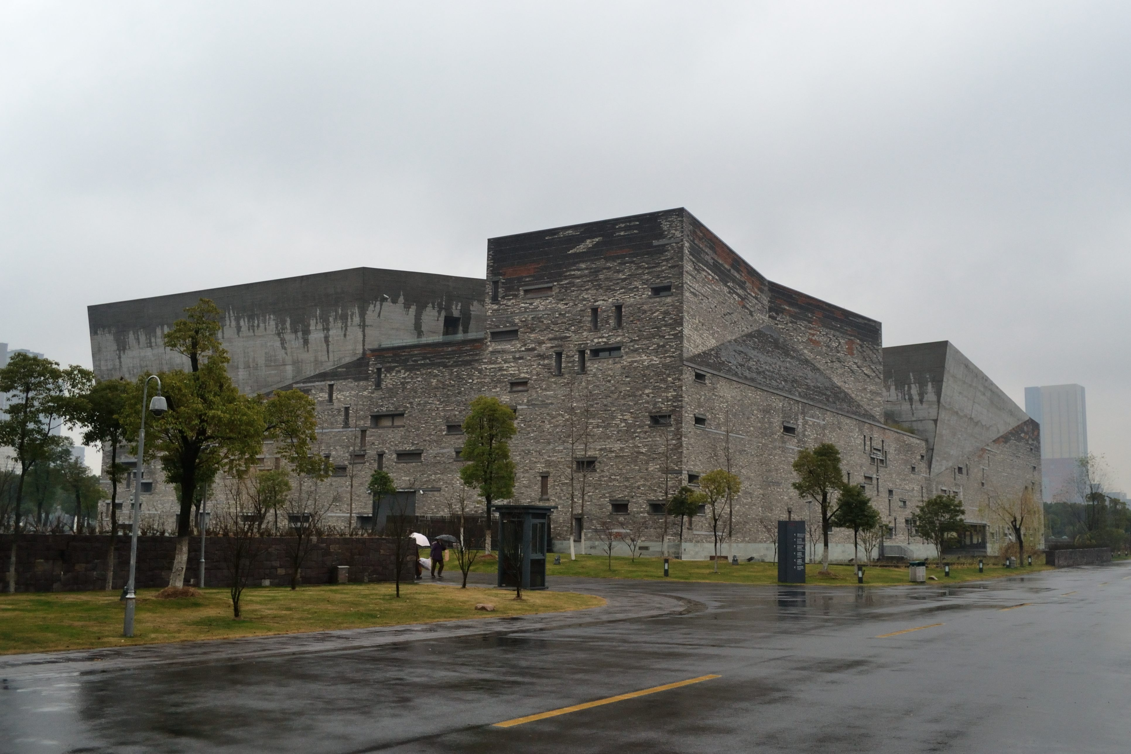 宁波博物馆北面